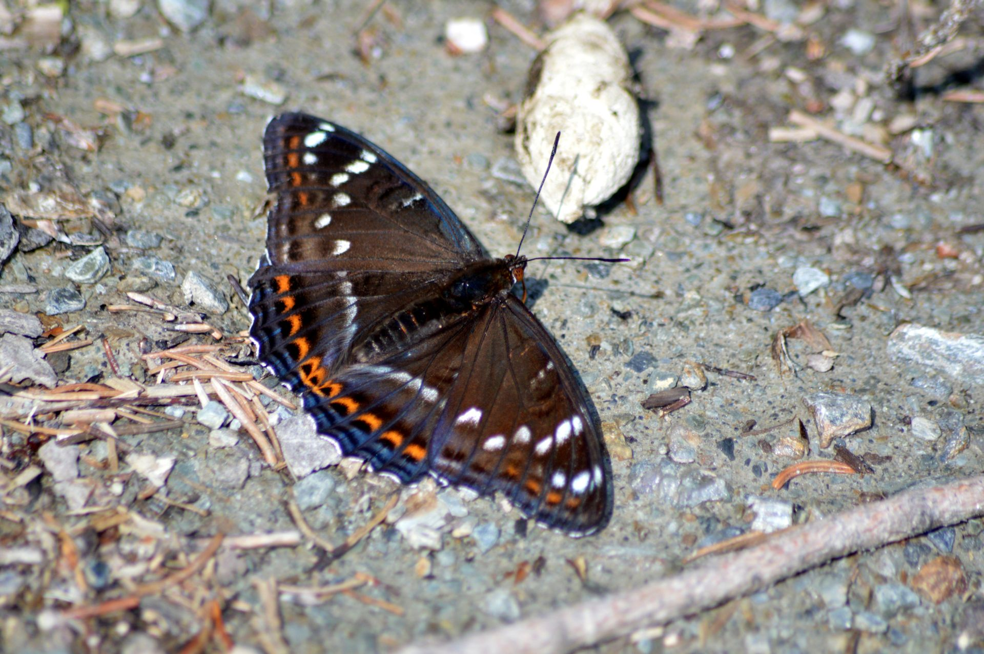 Großer Eisvogel, Flügeloberseite, neben Säugetierkot, Erlberg, östlich oberhalb Naturschutzgebiet Zeller See.